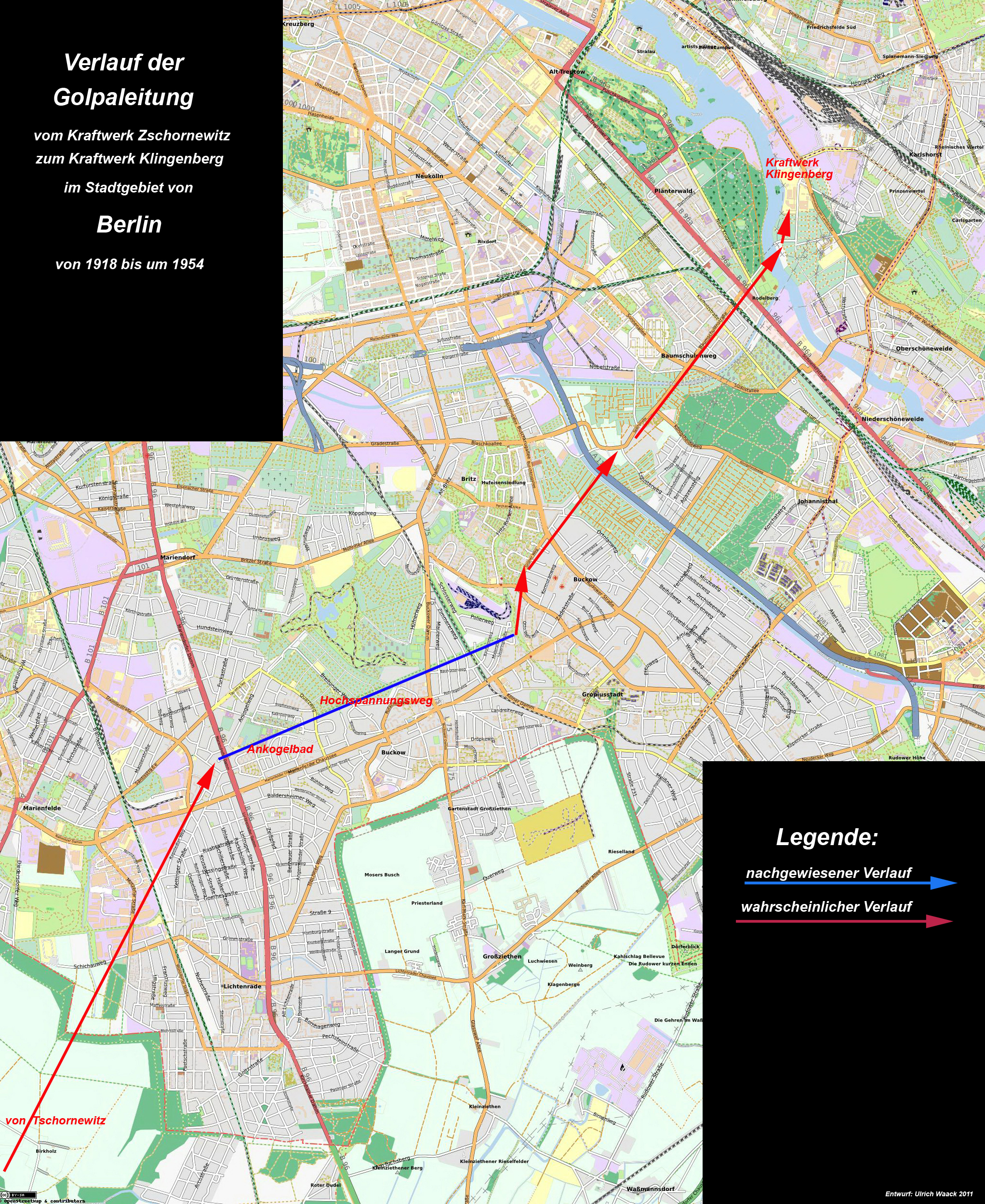 Verlauf der Golpa-Leitung vom Kraftwerk Zschornewitz zum Kraftwerk Klingenberg durch das Stadtgebiet von Berlin in der Zeit von 1918 bis um 1954